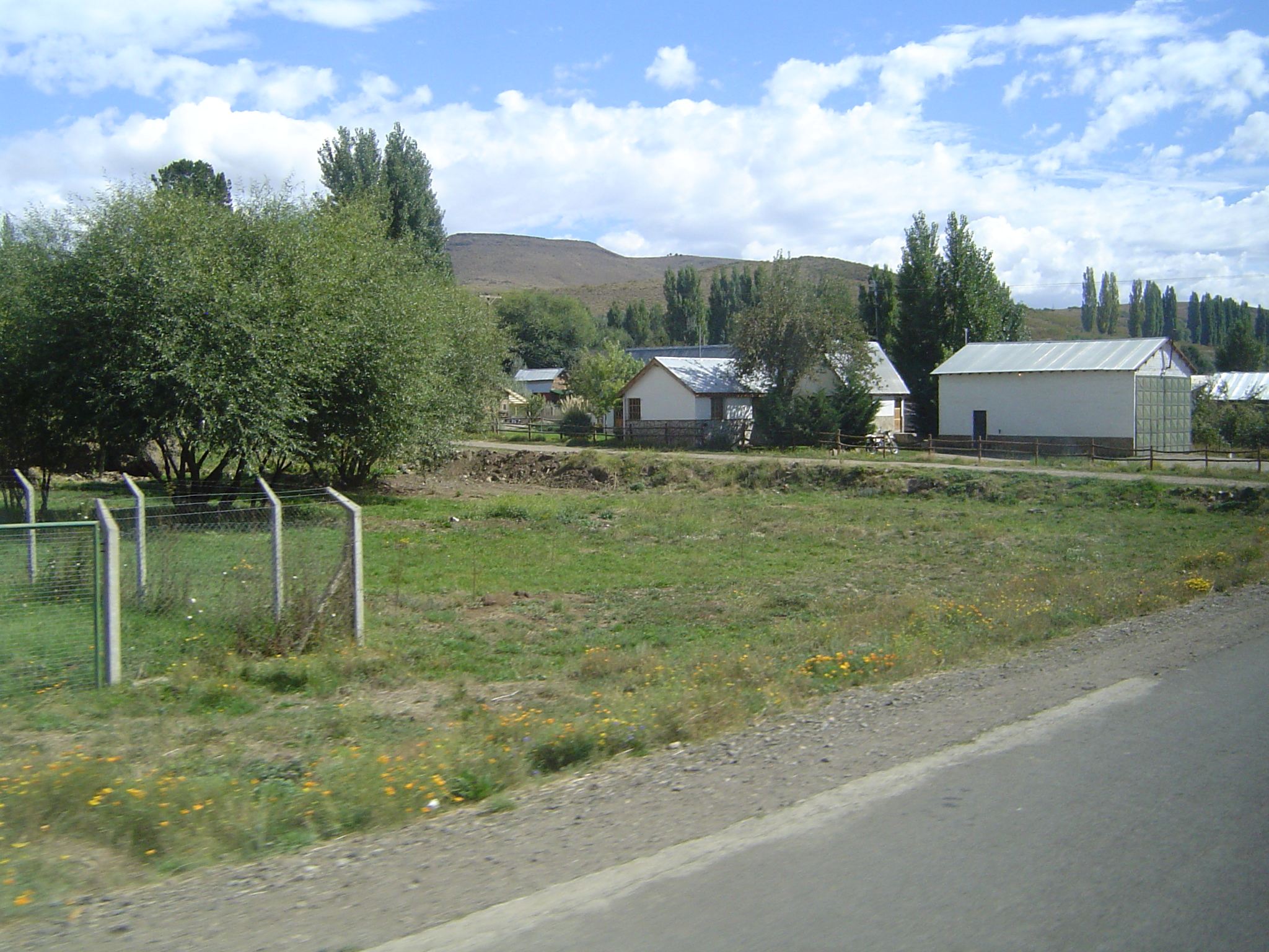 Localidad de Aluminé, provincia de Neuquén, Argentina.